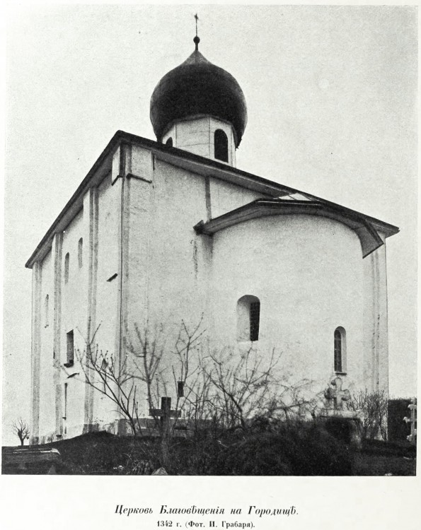 Благавешчанская царква на Рурыкавым Гарадзішчы ў Ноўгарадзе. Фотаздымак І.Э. Грабара да 1910 года.